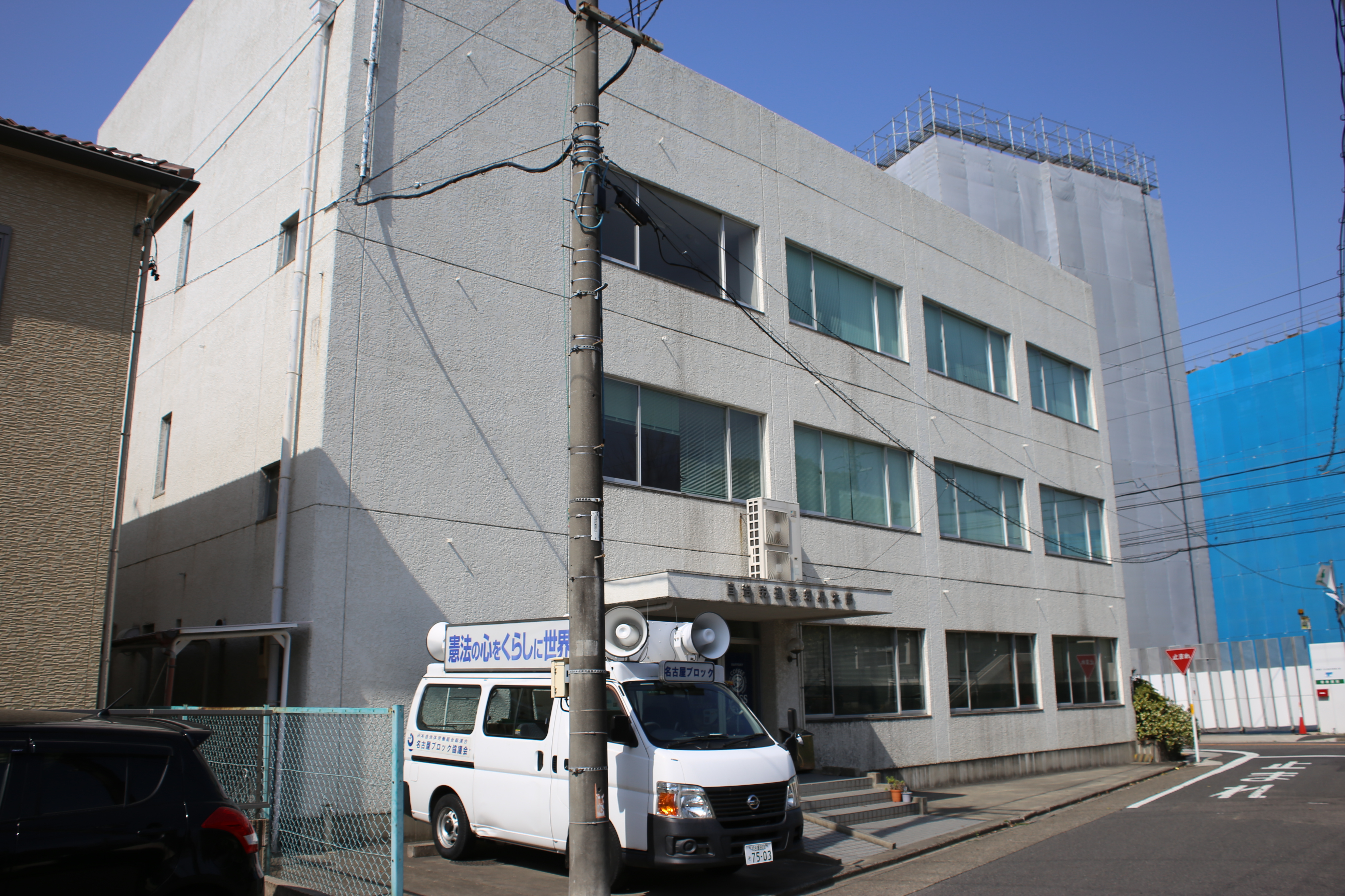 名古屋市北区柳原三丁目の自治労連愛知県本部を東側公道南側より撮影